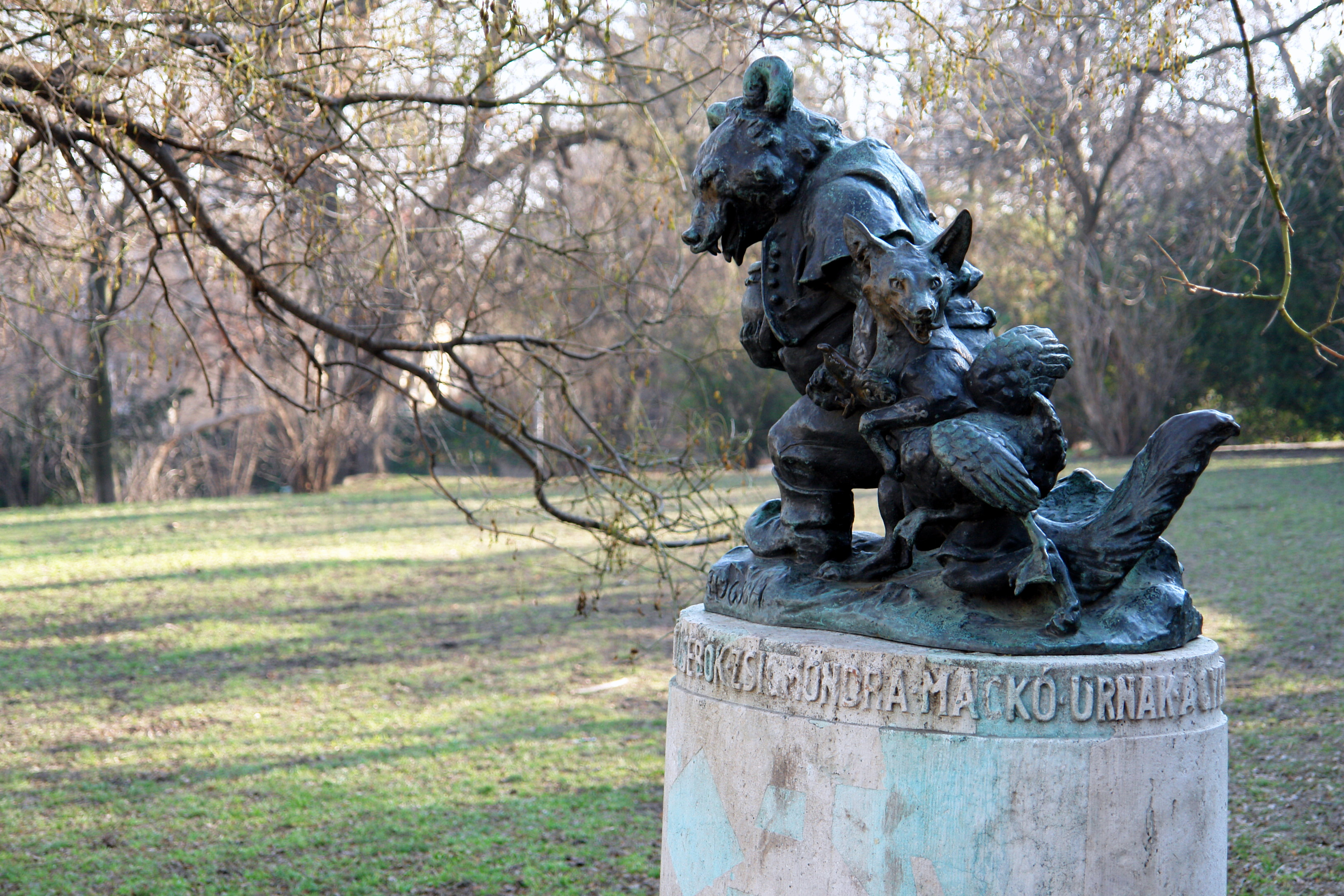 Mackó úrfi róka komával szobra (Maugsch Gyula, 1934) 1936-ban a Lukács fürdő előtt állították fel, 1970-ben helyezték ide a budapesti, Várkerületben található Európa ligetbe ( kozterkep.hu ).